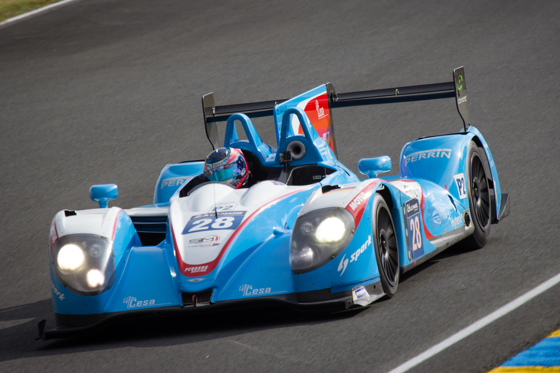 Drivers: Inès Taittinger, Rémy Striebig, Léo Roussel